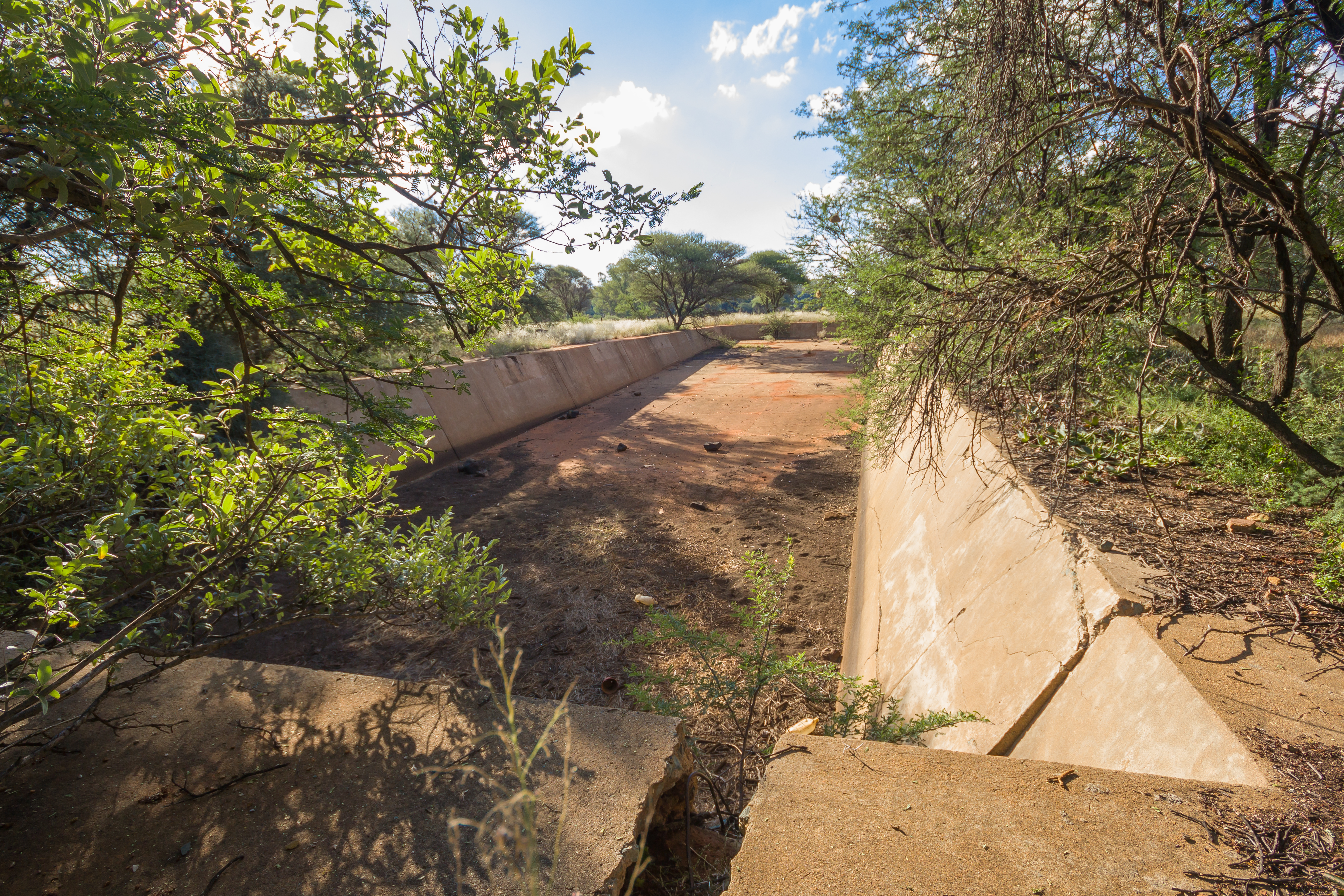 Altes Schwimmbad im ehemaligen Internierungslager Andalusia